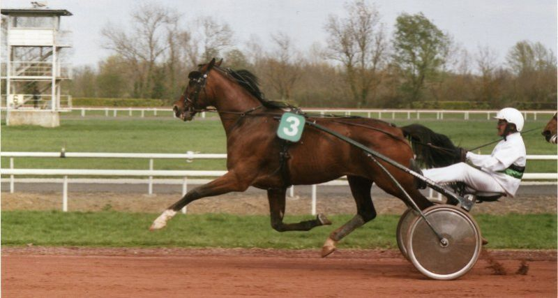 Ilster d'Espiens, cheval de course, né en 1996.